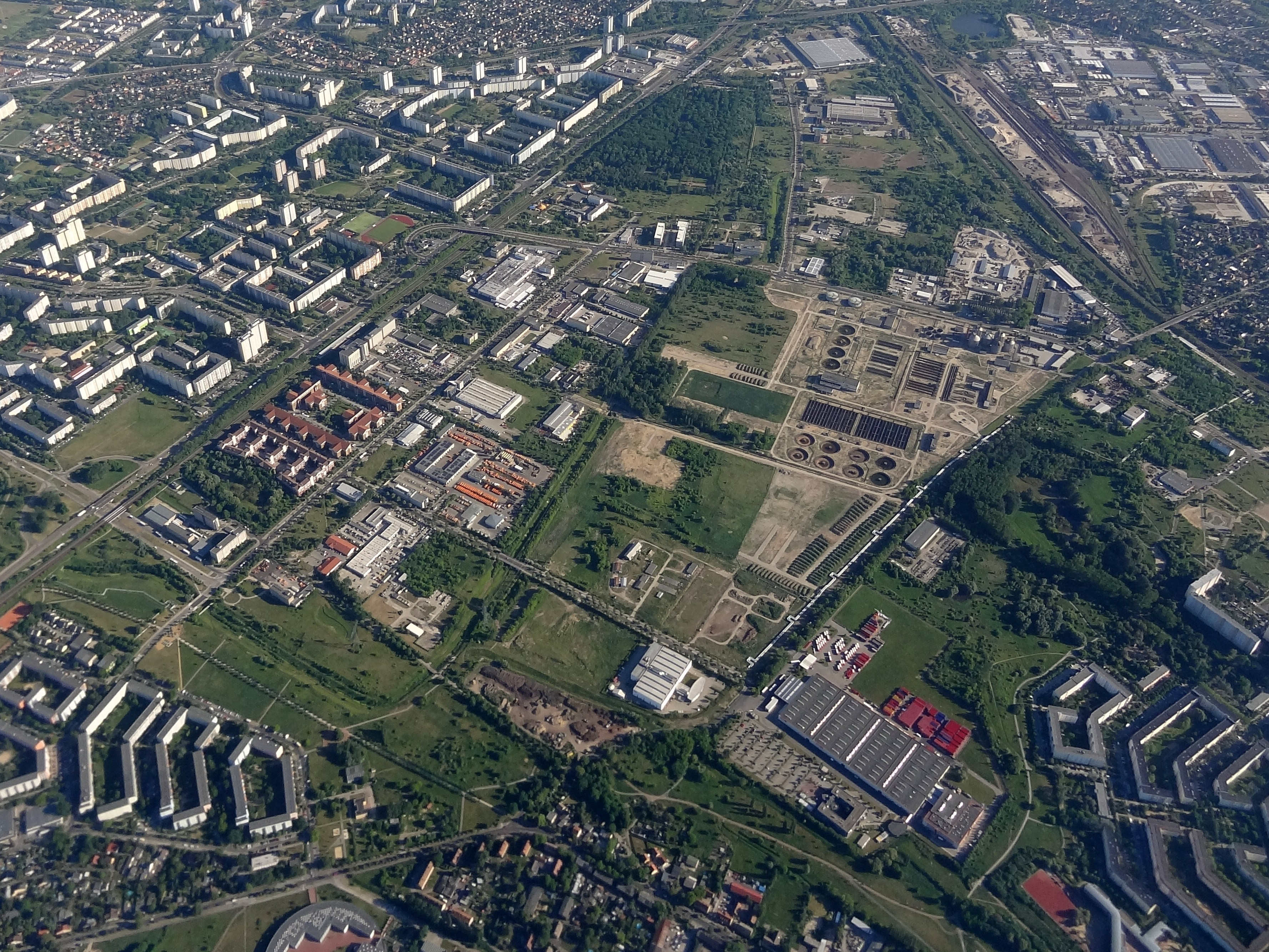 Blick auf Berlin-Marzahn, Berlin, Deutschland